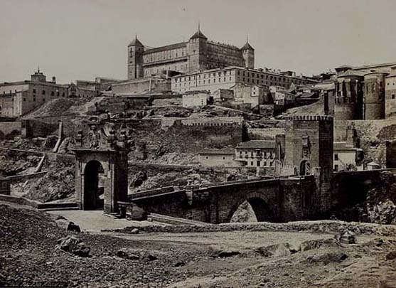 Toledo. Vista del Alcázar desde el puente de San Martín.